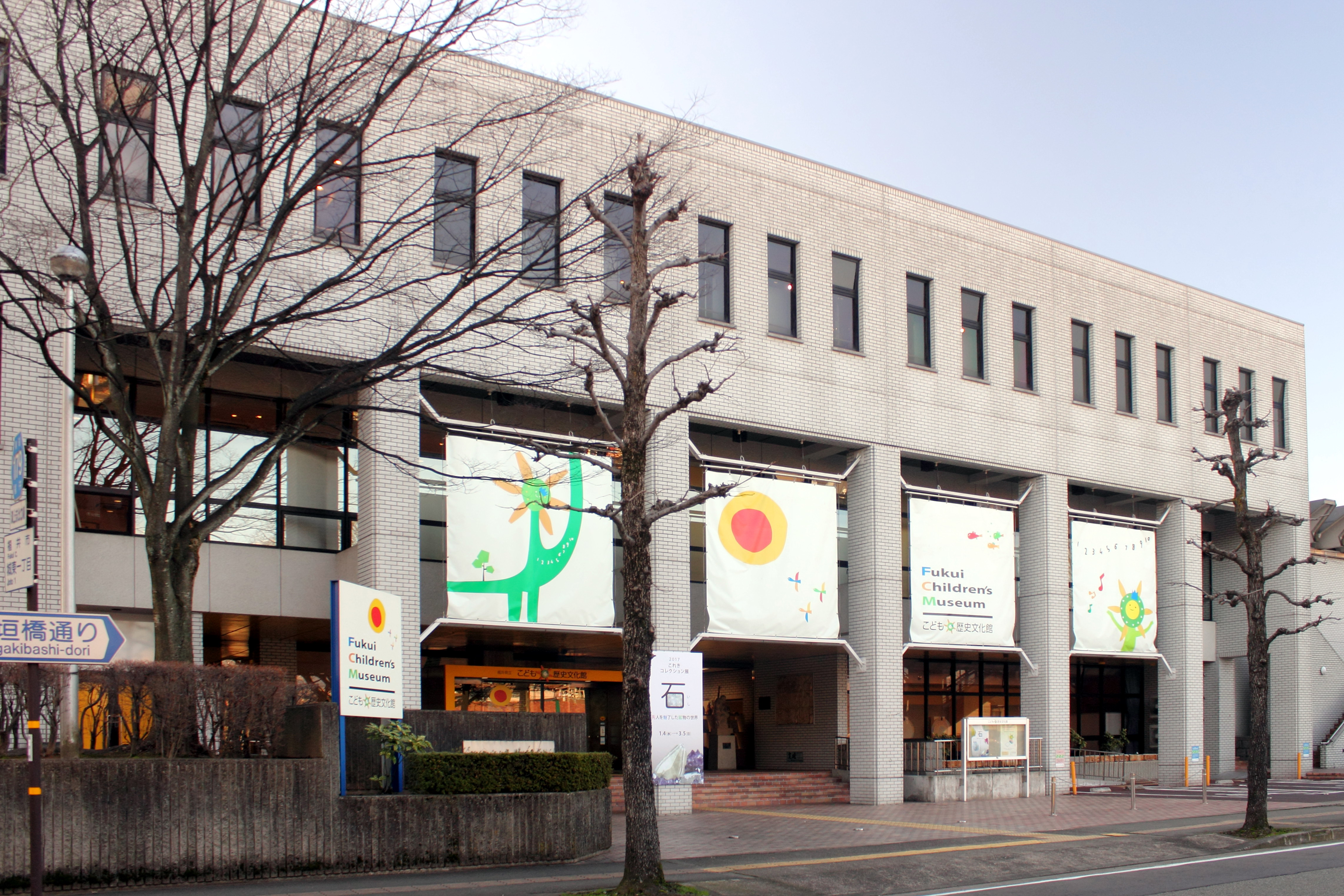 福井県立こども歴史文化館